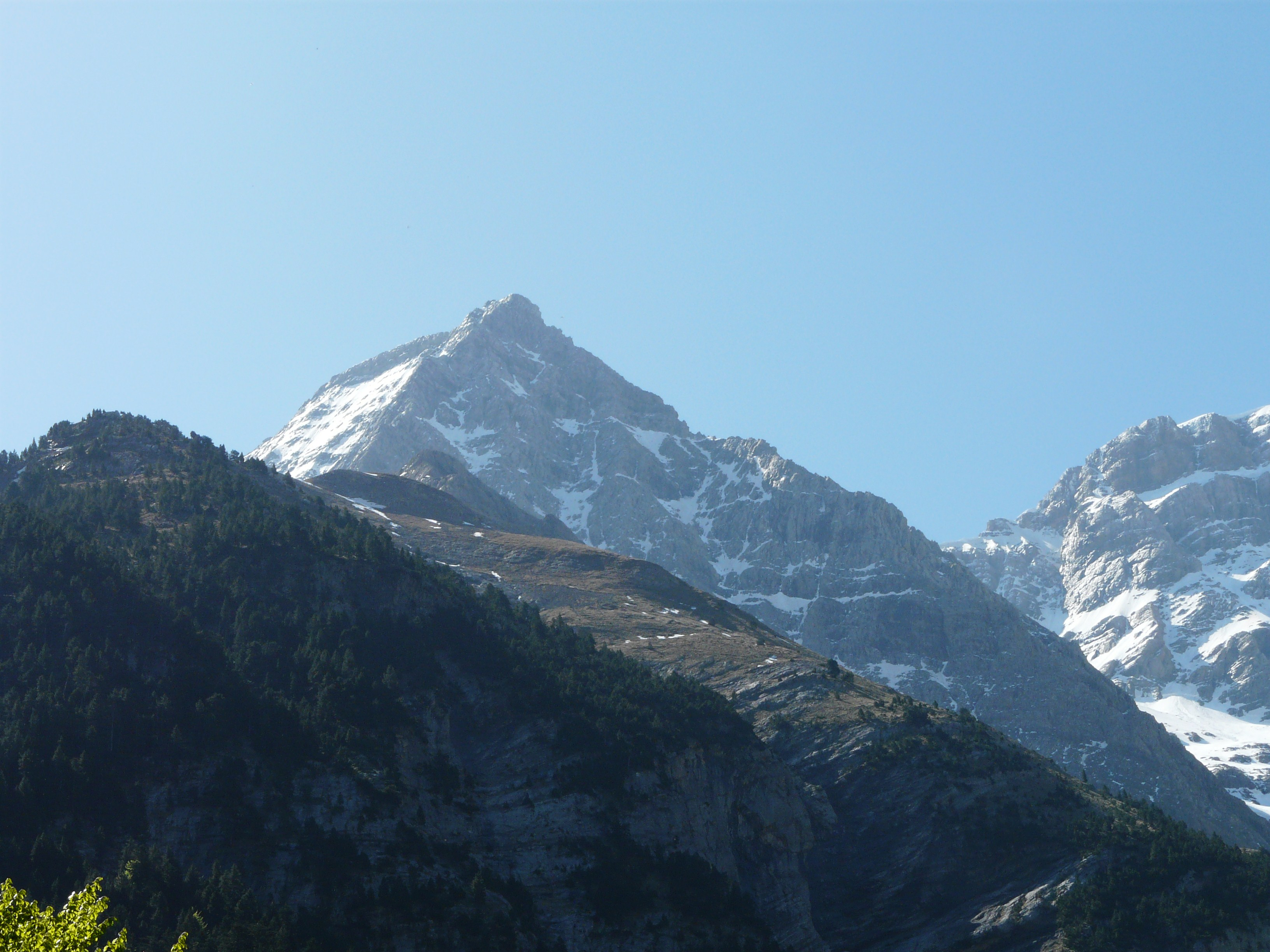 Le Petit Astazou (3012 m), Cirque de Gavarnie, Hautes-Pyrénées, France.